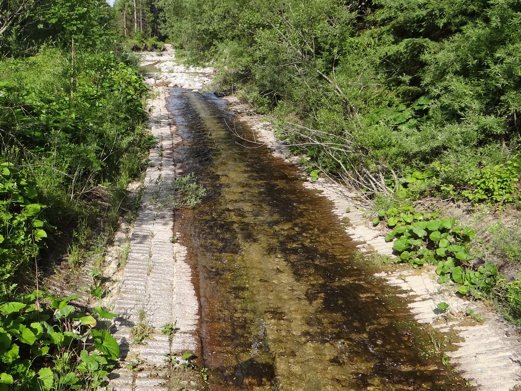 Suchy Potok Sielnicki